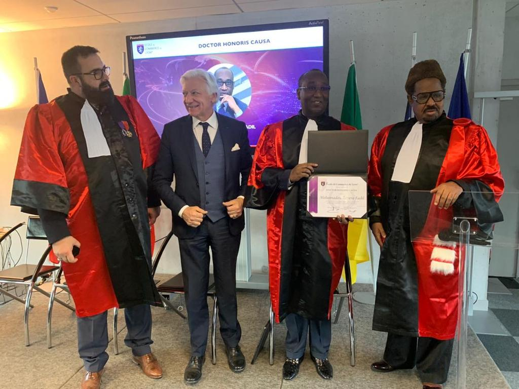 Cérémonie de distinctions docteur honoris causa pour le sénateur Bayero Fadil